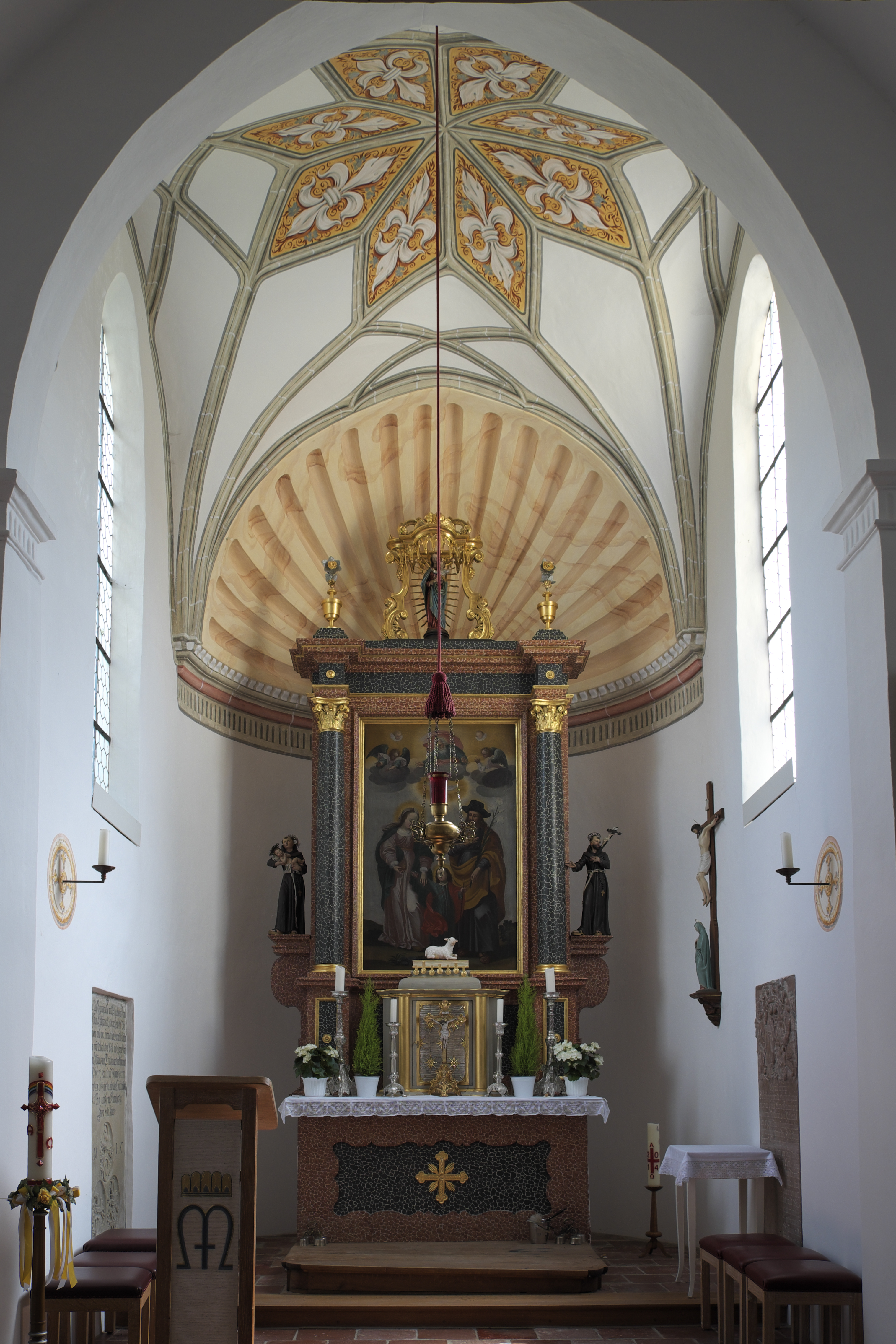 Ehemalige Burgkapelle St. Cajetan der Burg Spielberg in Oberschweinbach im Landkreis Fürstenfeldbruck (Bayern/Deutschland), Chor